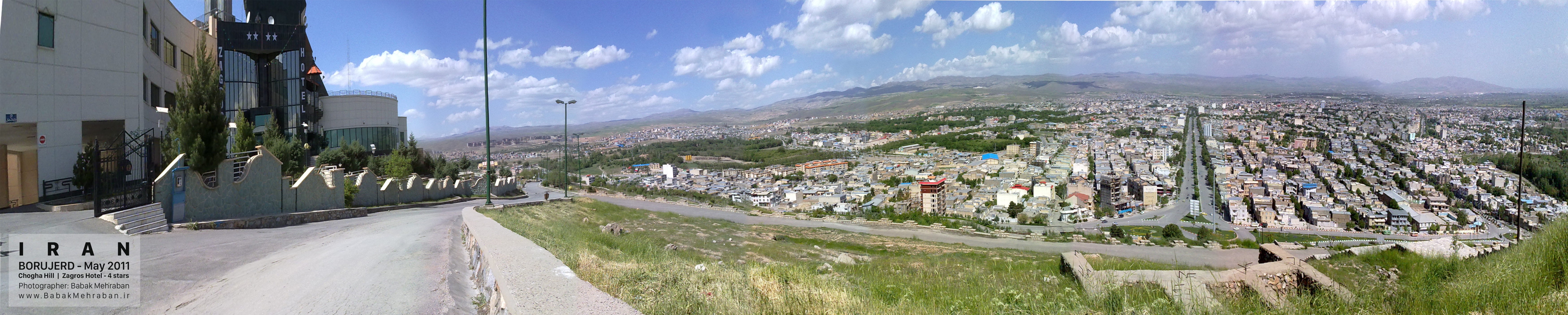 نمایی از بروجرد از فراز تپه چغا در کنار هتل زاگرس بروجرد عکاس : بابک (علی) مهربان